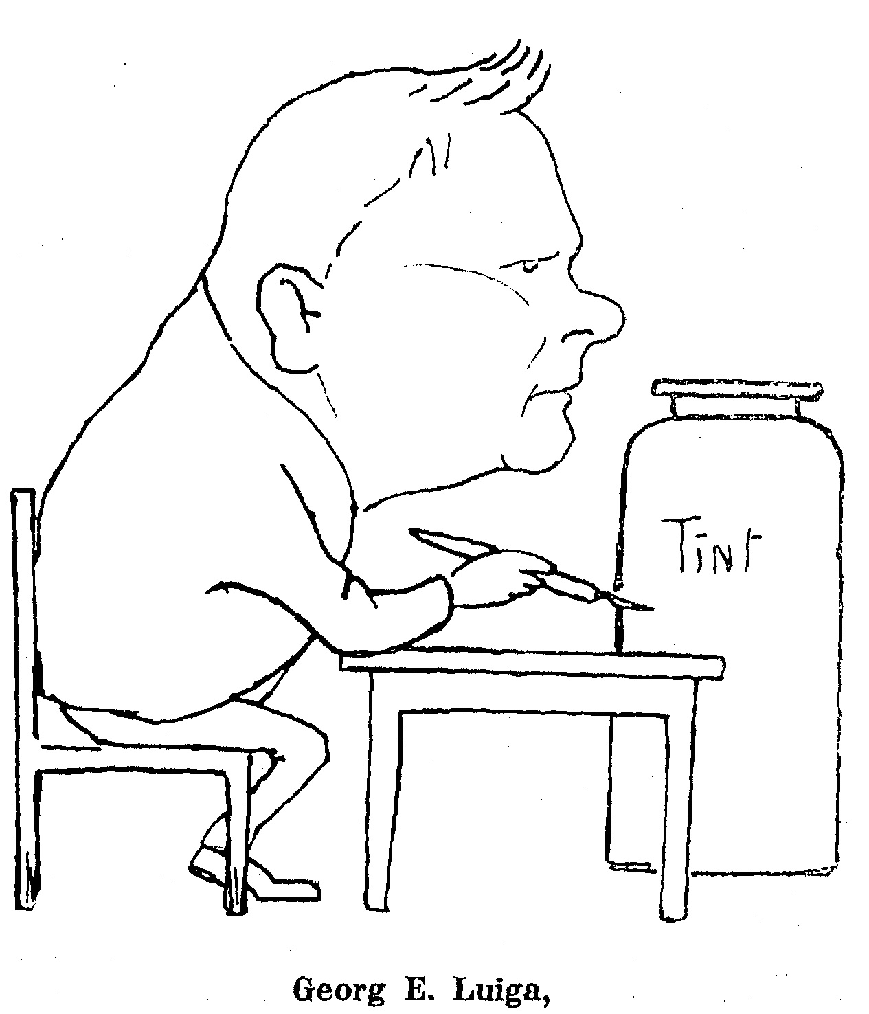 Karl August Hindrey šarž - Georg Eduard Luigast